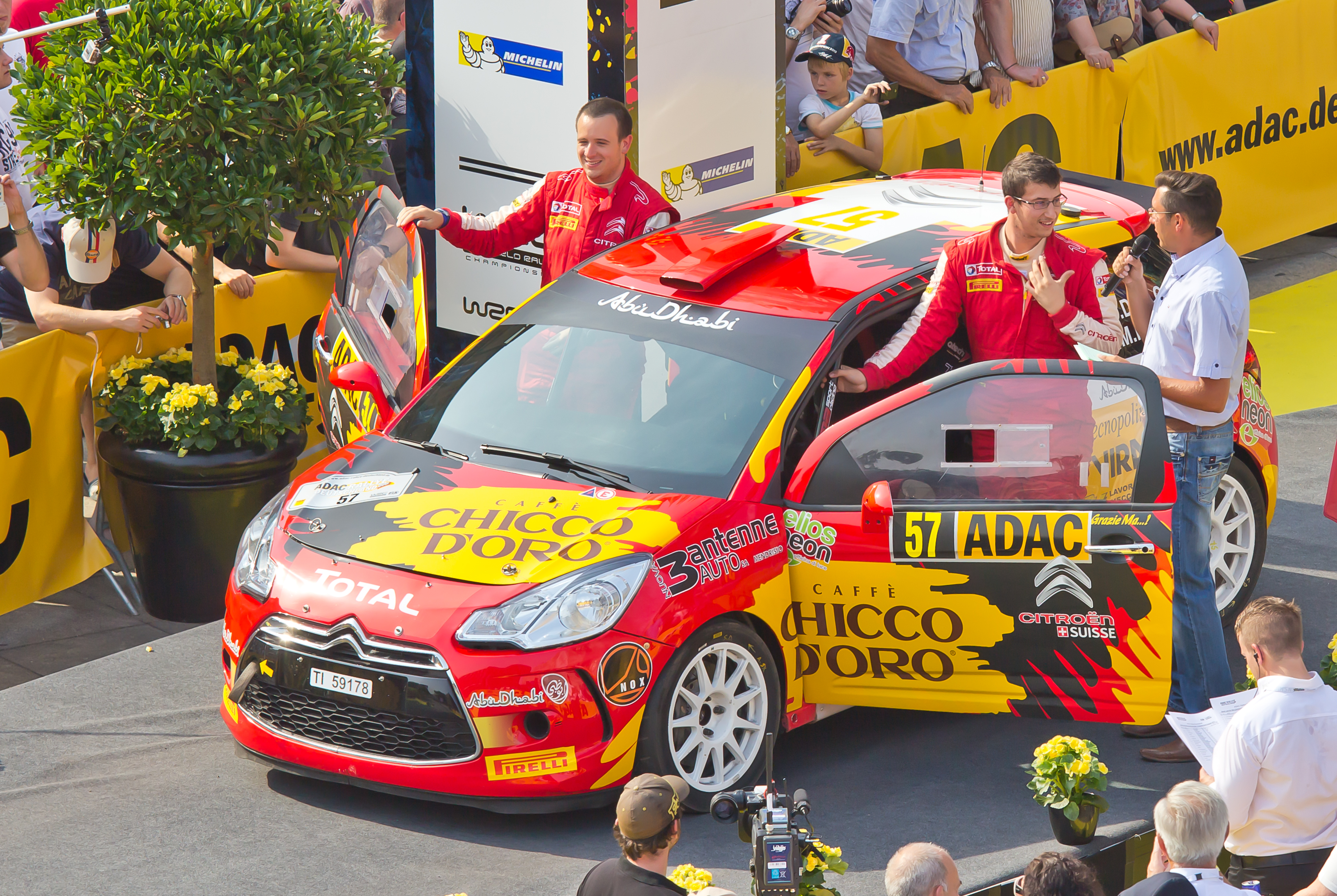 ADAC Rallye Deutschland 2013 - Fahrerpräsentation auf dem Roncalliplatz: Fahrer Federico della Casa und Co-Fahrer Marco Menchini im Citroën DS3 R3T